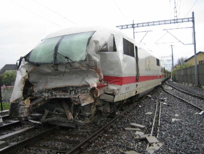 Kollision zwischen dem ICE Nr. 278 und zwei Re 465 am Freitag, 28. April 2006 in Thun: Triebkopf des ICE